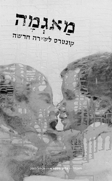 גיליון מס' 4